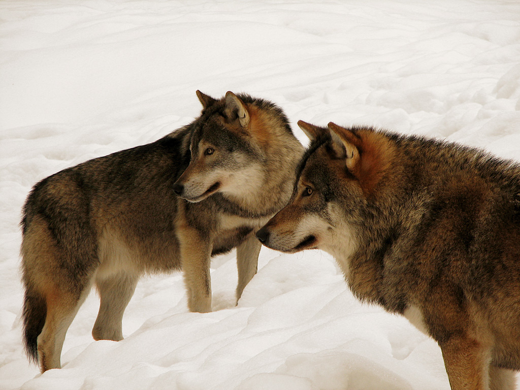 Lobos en el safari park Kolmården (Suecia).